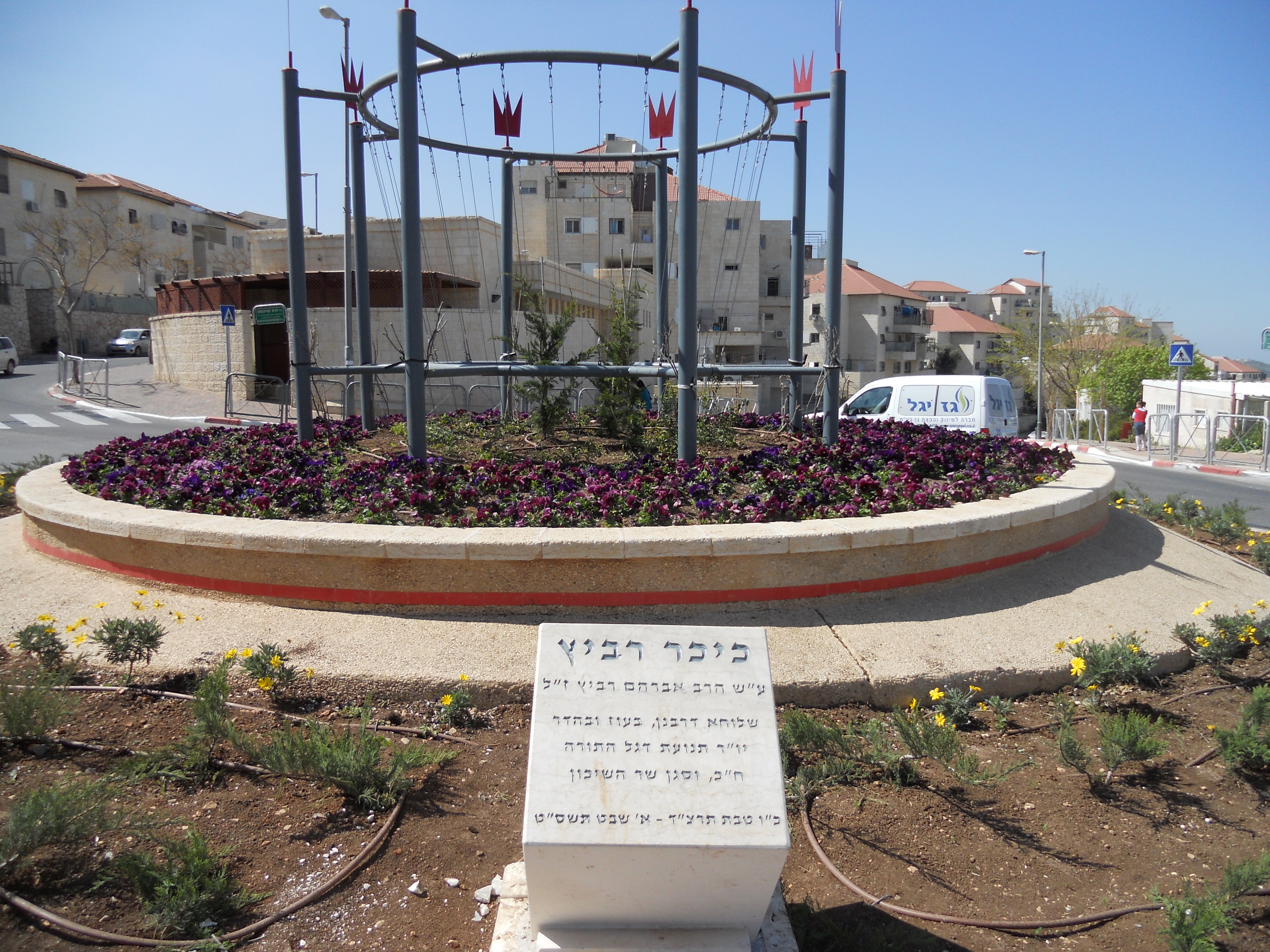 כיכר על שם הרב אברהם רביץ בביתר עילית תשע"ב